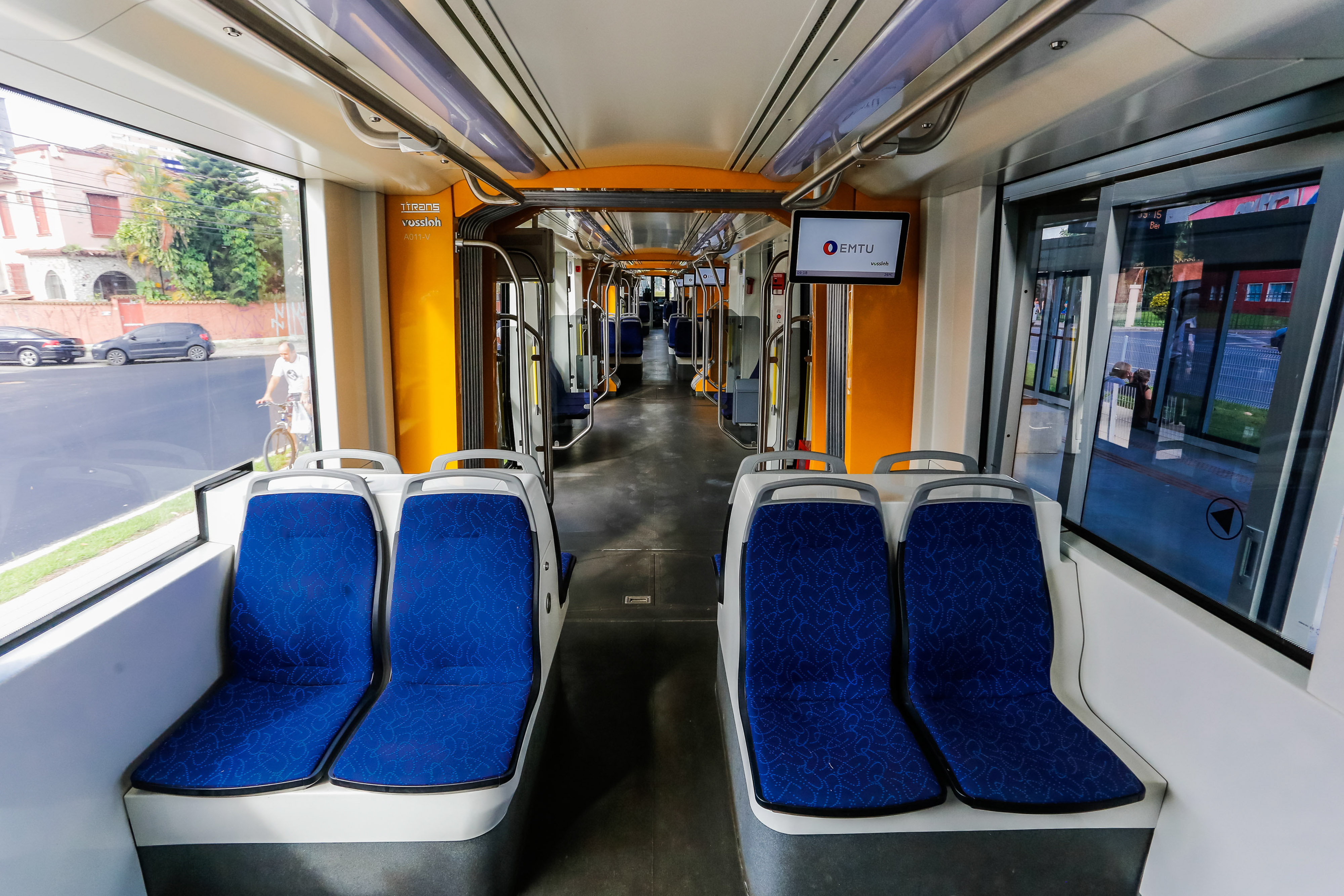 O Governador do Estado de São Paulo, Dr. Geraldo Alckmin, entregou as Estações Ana Costa, Washington Luís, Porto e Terminal Barreiros para operação e além de dois novos trens, do VLT, da EMTU/SP. Local: Santos/SP. Data: 31/01/2017. Foto: Alexandre Carvalho/A2img